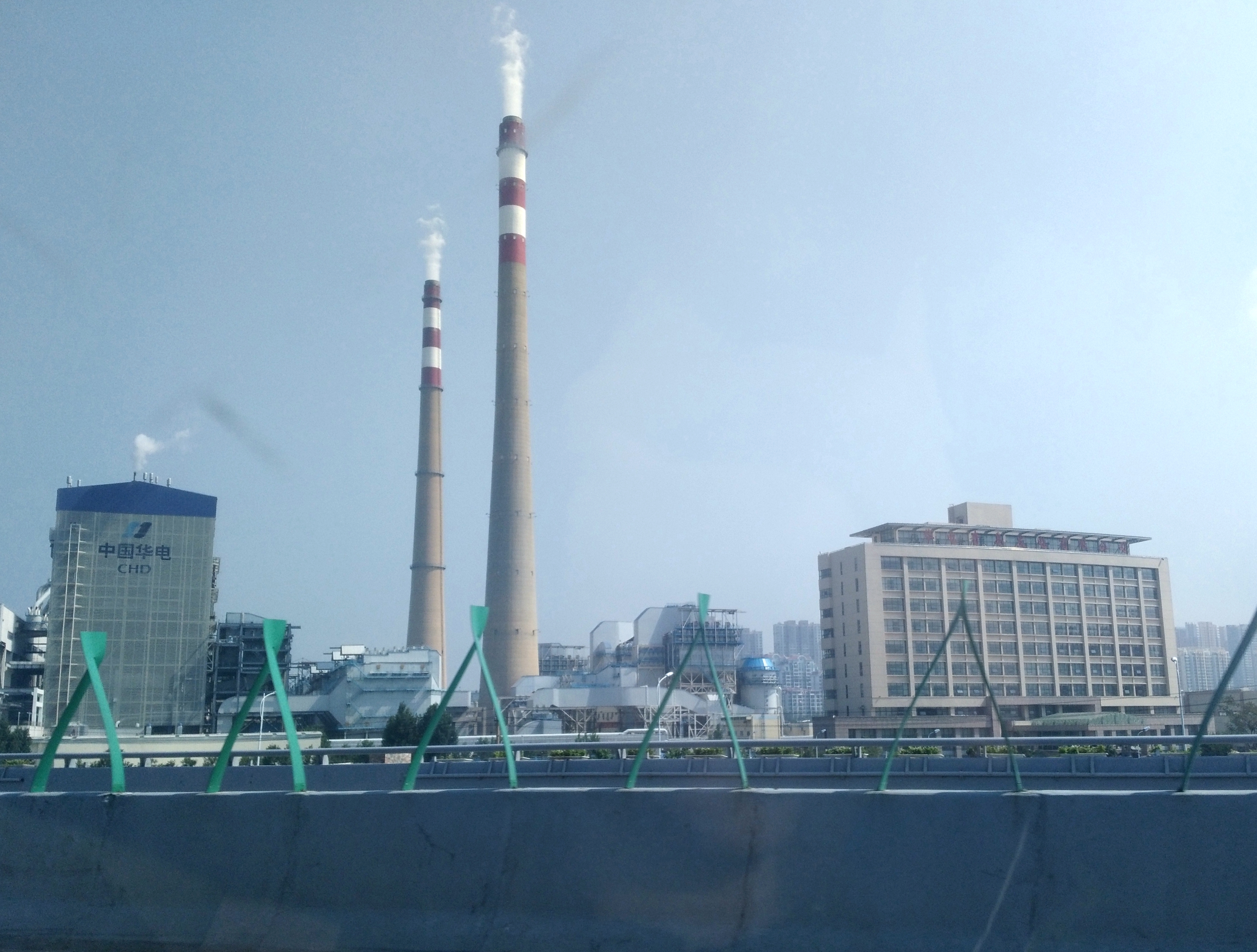 青岛发电厂